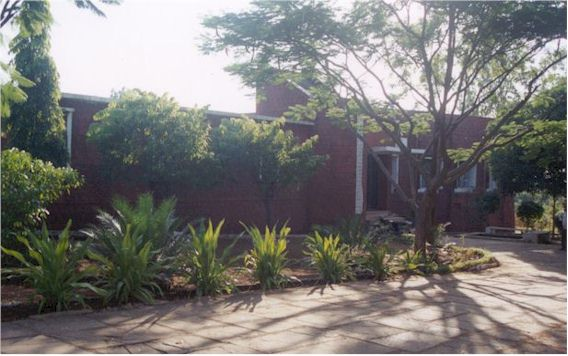 सागर विश्वविद्यालय के अंग्रेज़ी तथा यूरोपीय भाषा विभाग